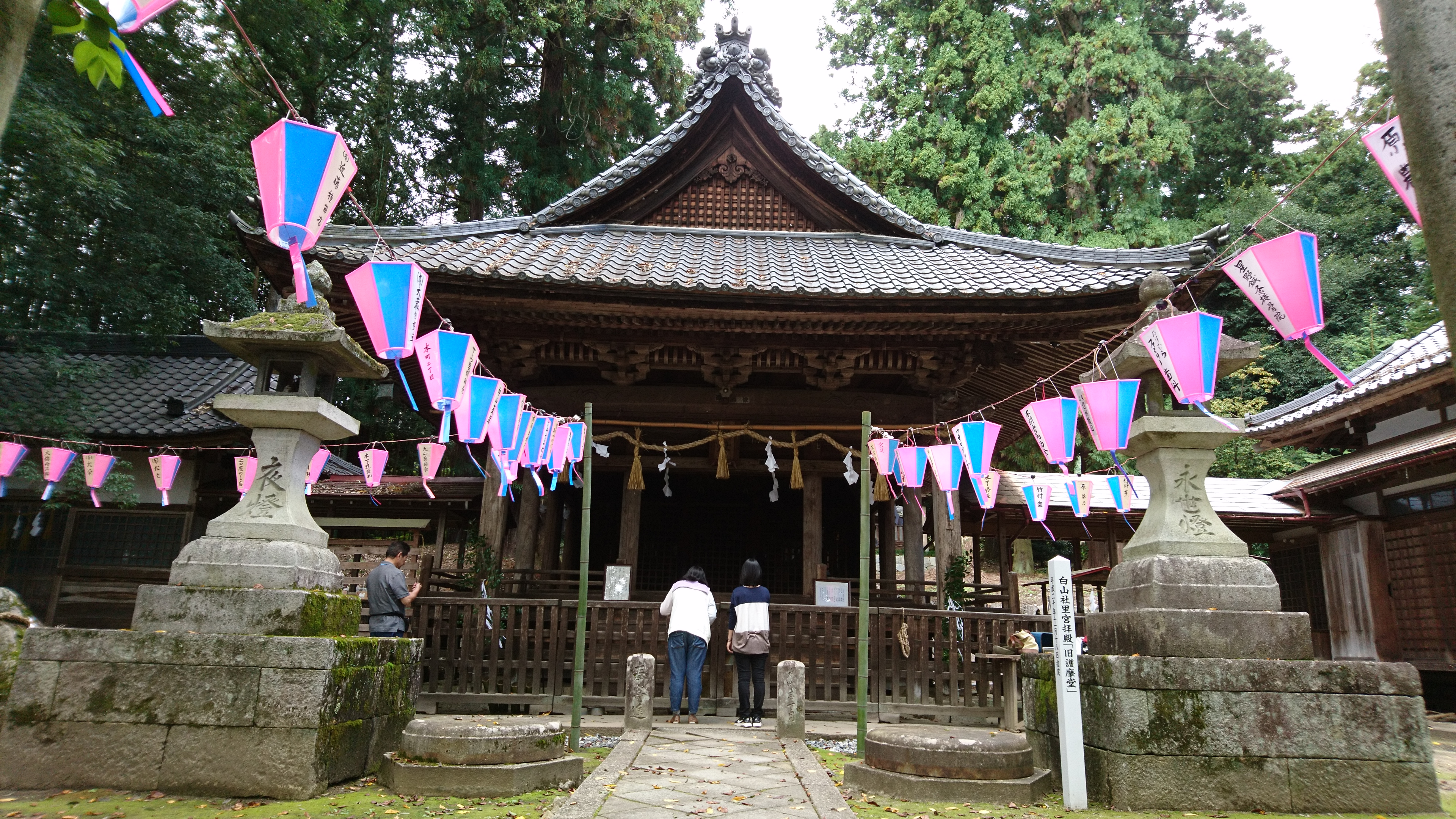 白山社里宮拝殿